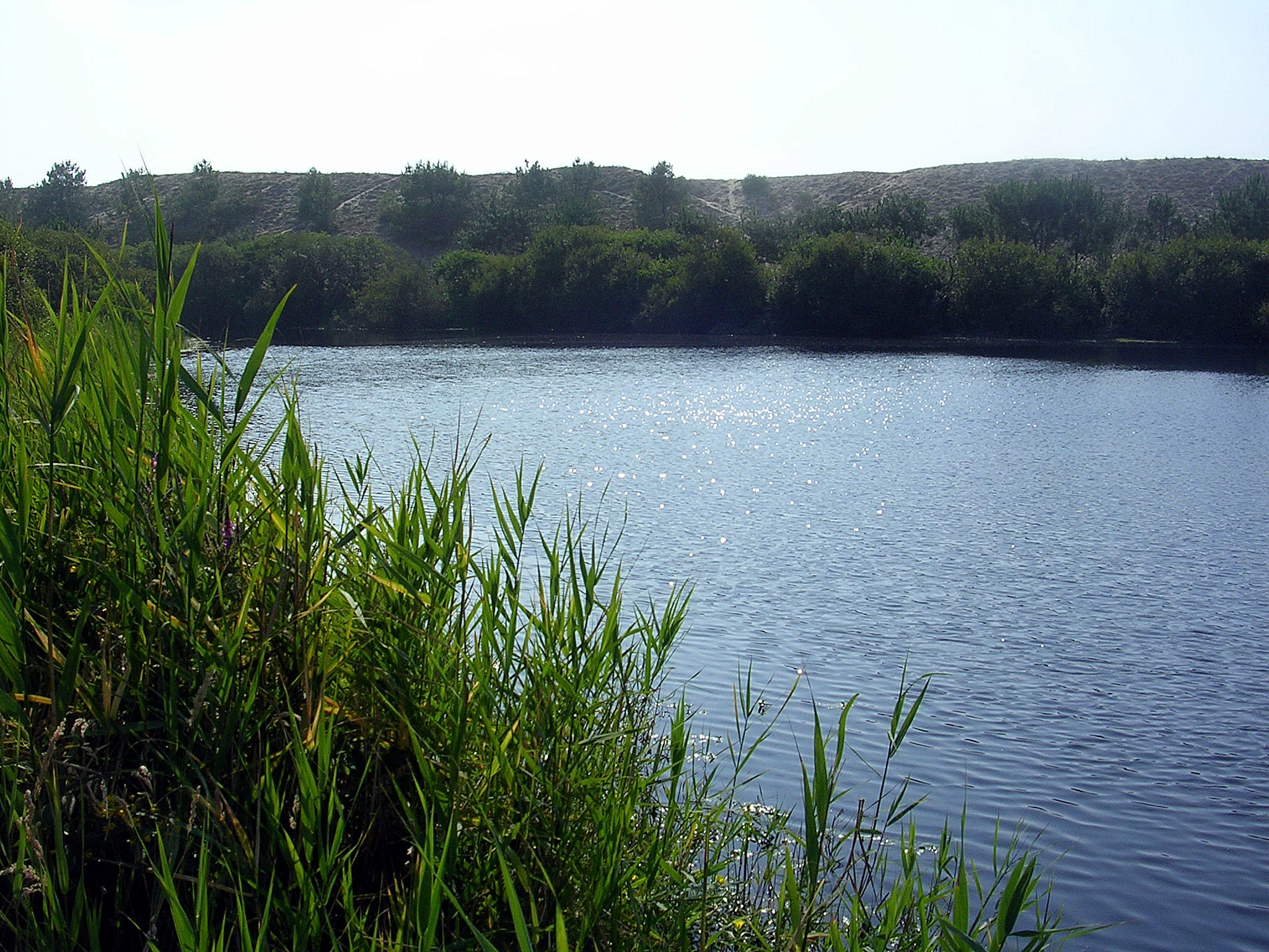 Petit étang de Mailloueyre. Photo prise par Jibi44 en juillet 2006 à Mimizan (Landes, France).